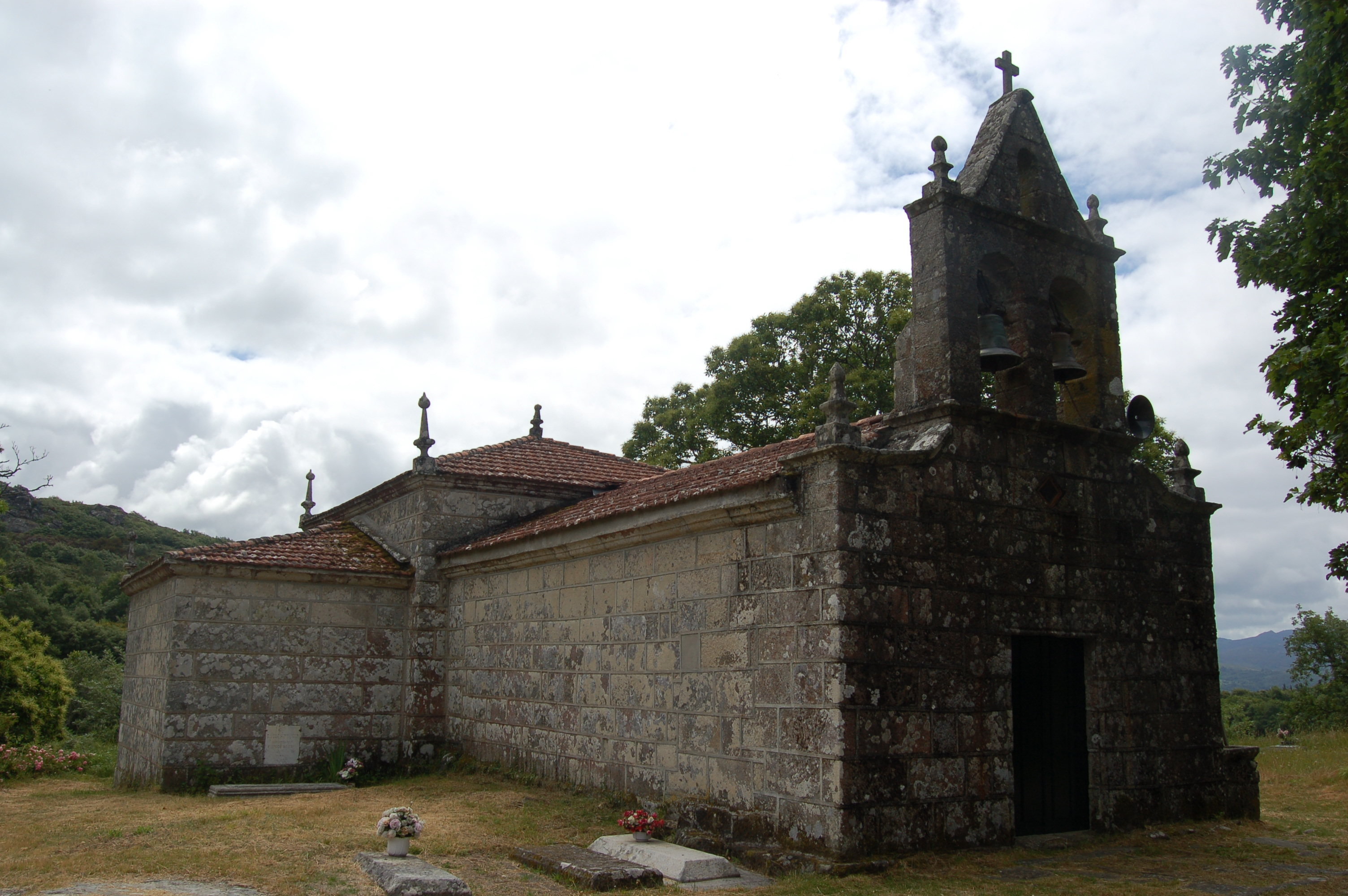 Igrexa parroquial de Santa Cristina de Monte Longo, no castro de Coto da Xulleira, no lugar de Nogueira (Lobeira)